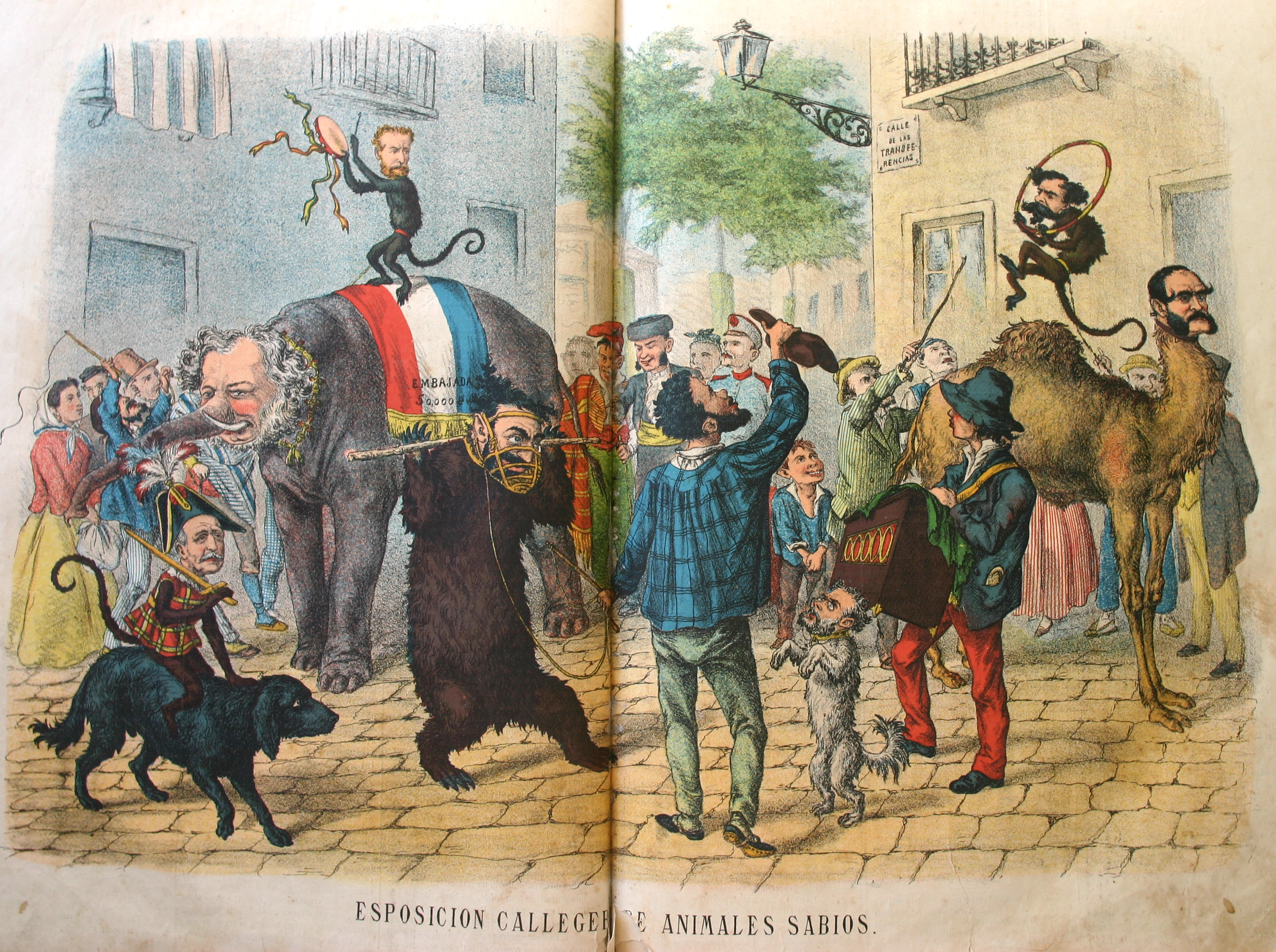 Il·lustració publicada el 24 de juliol de 1872 a La Carcajada.